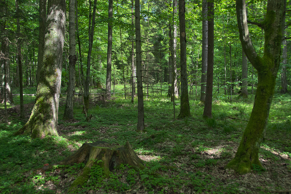 Rezerwat Starożyn